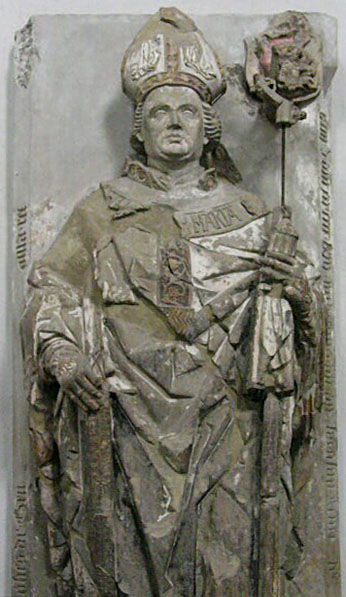 Darstellung des Fürstbischofs Johann III. von Grumbach auf seinem Epitaph im Würzburger Dom